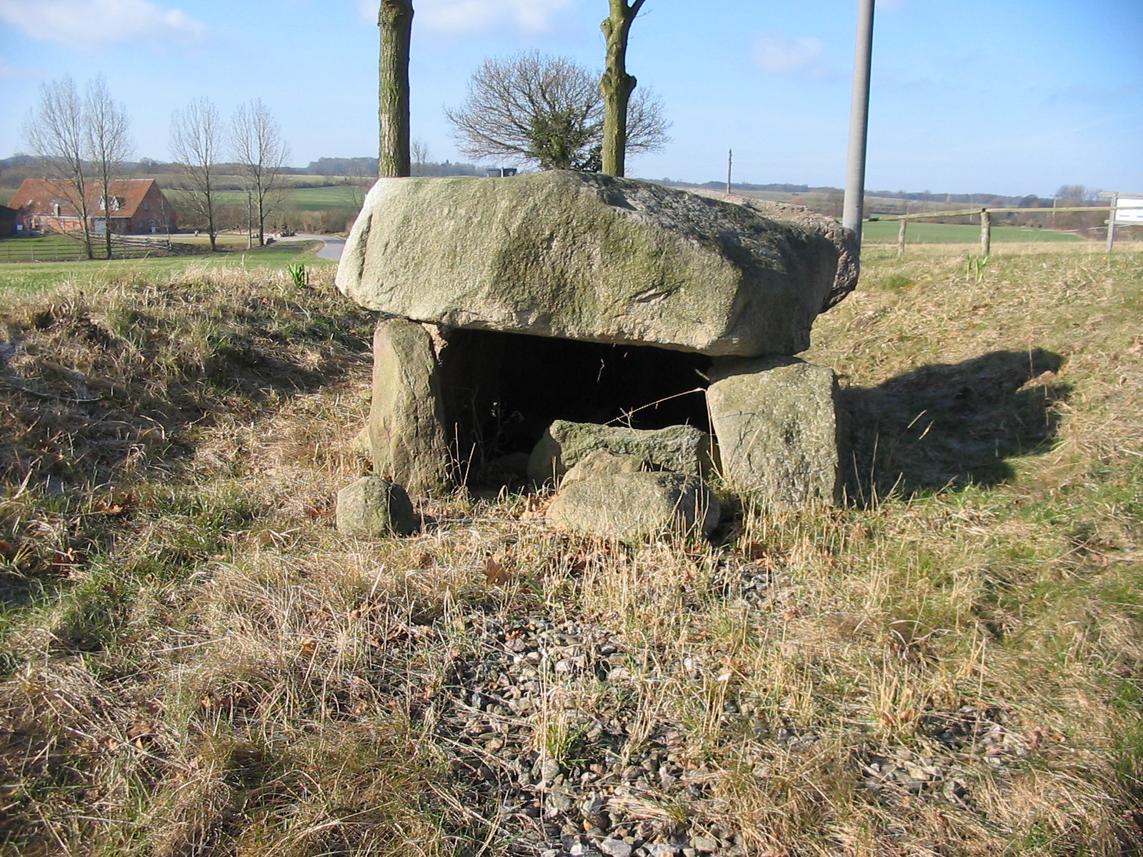 Megalithgrab Grammdorf Steingrab 2, Grammdorf Wangels Ostholstein Latitude: 54.264600N Longitude: 10.831500E keine Sprockhoff-Nr.